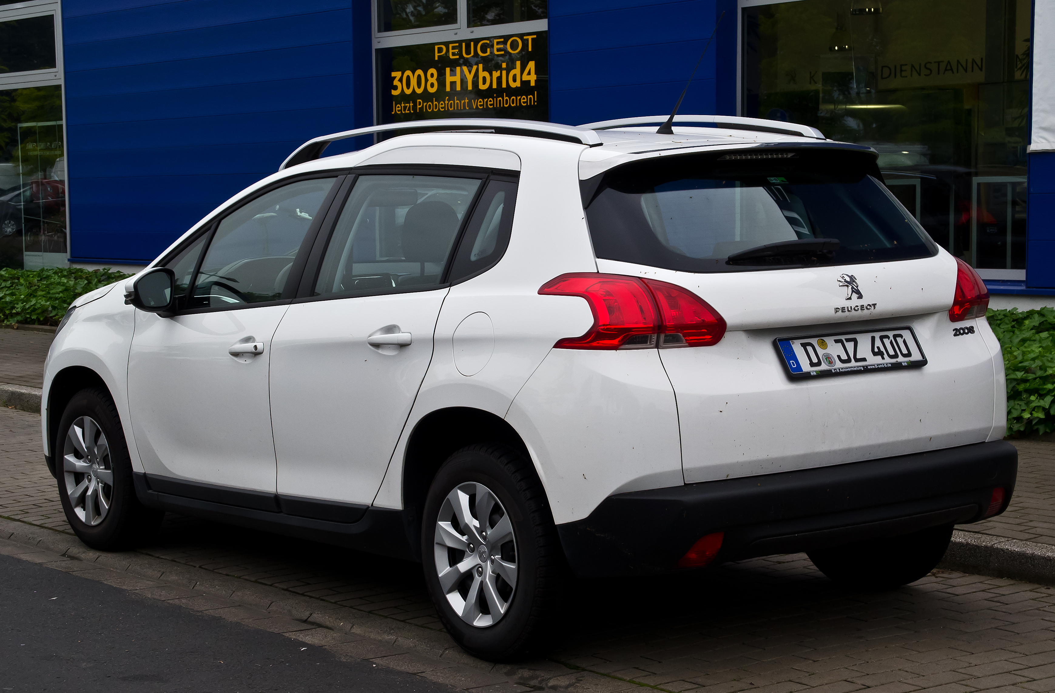 Peugeot 2008 82 VTi Access